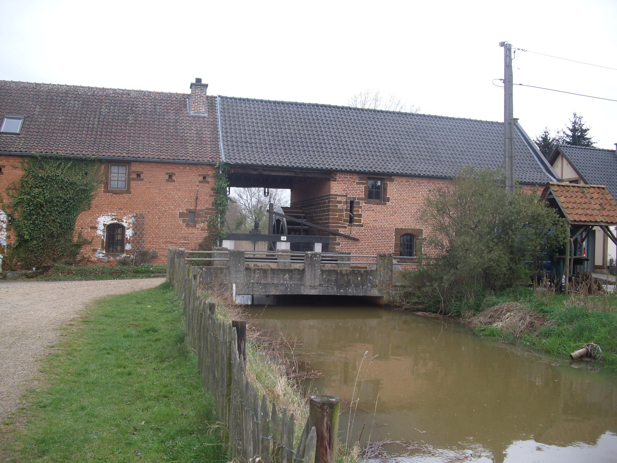 Kleine molen op de Mangelbeek - Lummen - Limburg - België